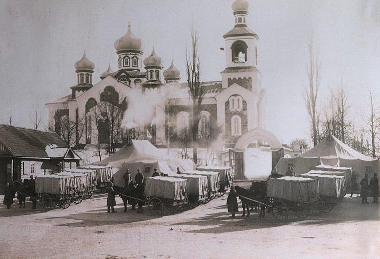 Беларуская (тарашкевіца): Турэц (Turec), пляц Рынак (plac Rynak). Пакроўская царква-мураўёўка